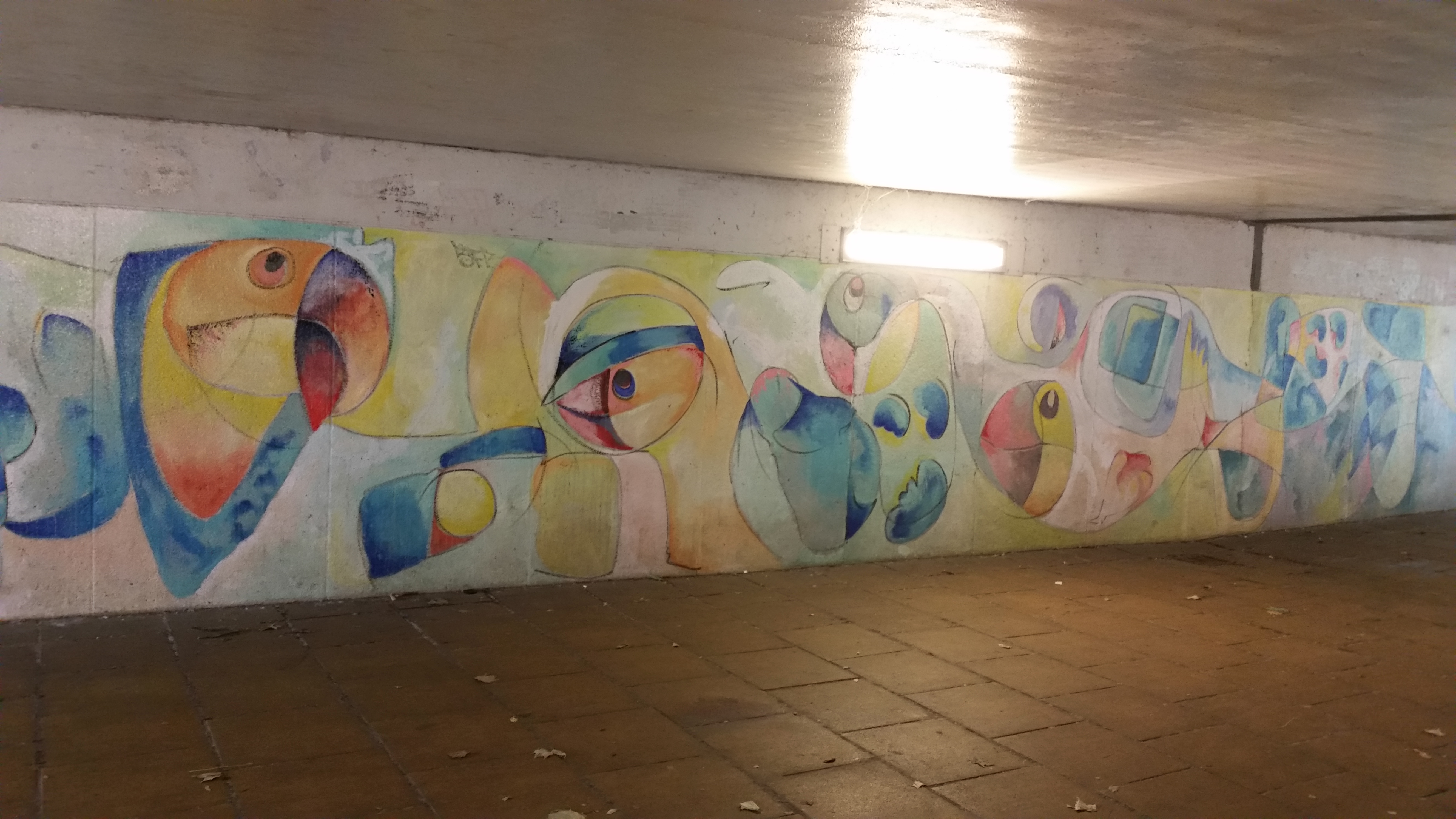 Brug 472 in de Flevoweg, Indische Buurt, Amsterdam, Kunstwerk Domingos Martins